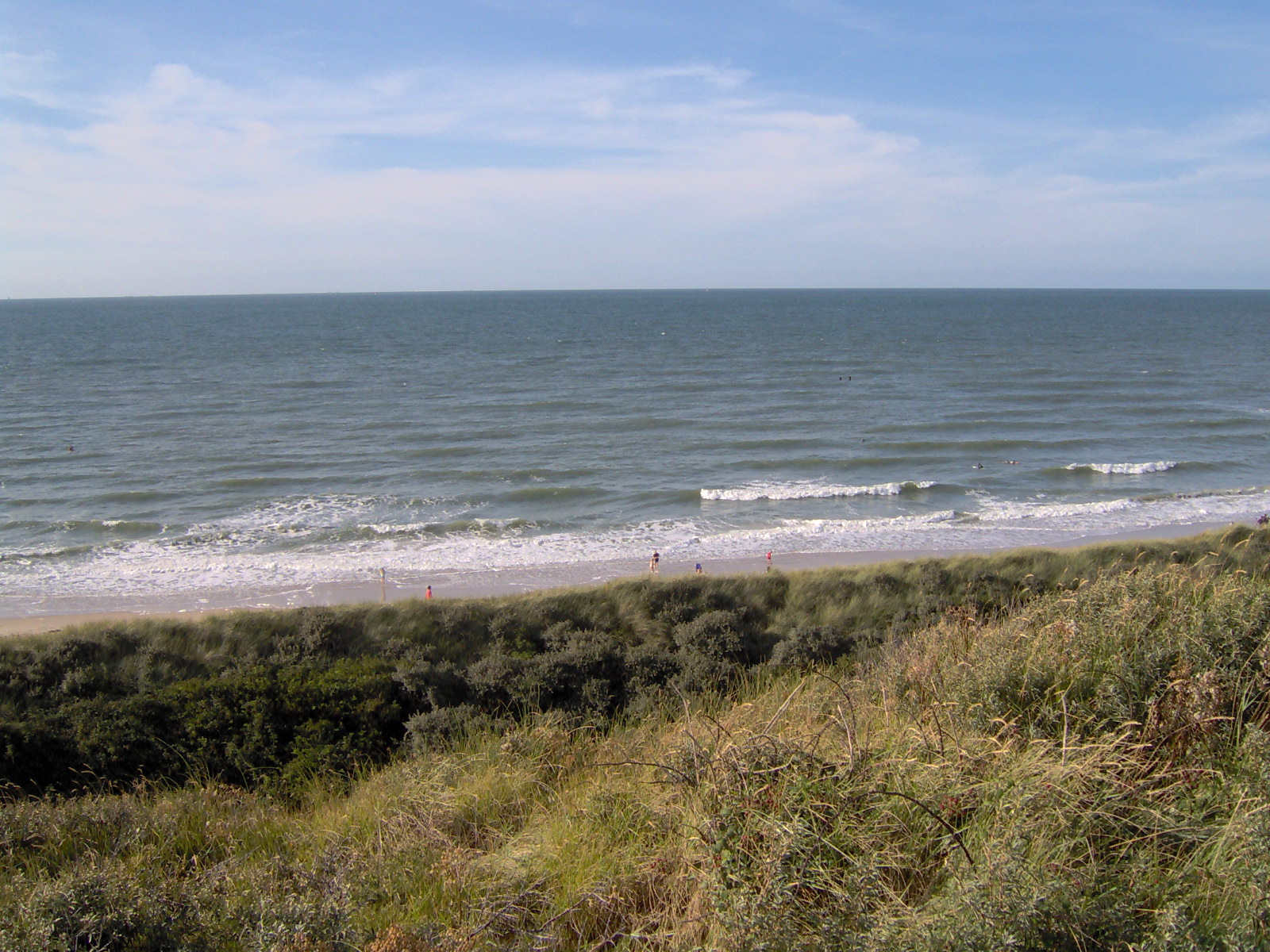 Zicht op een deel van de duinen nabij Domburg. Niet ver van het natuurgebied Manteling